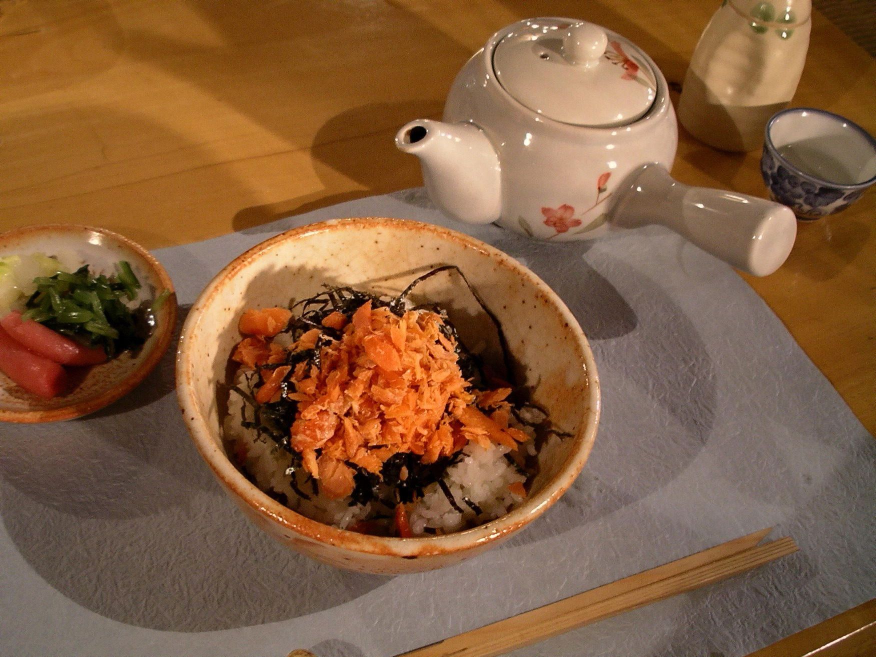 Ochazuke.お茶漬け